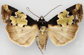 Bryolymnia viridimedia female